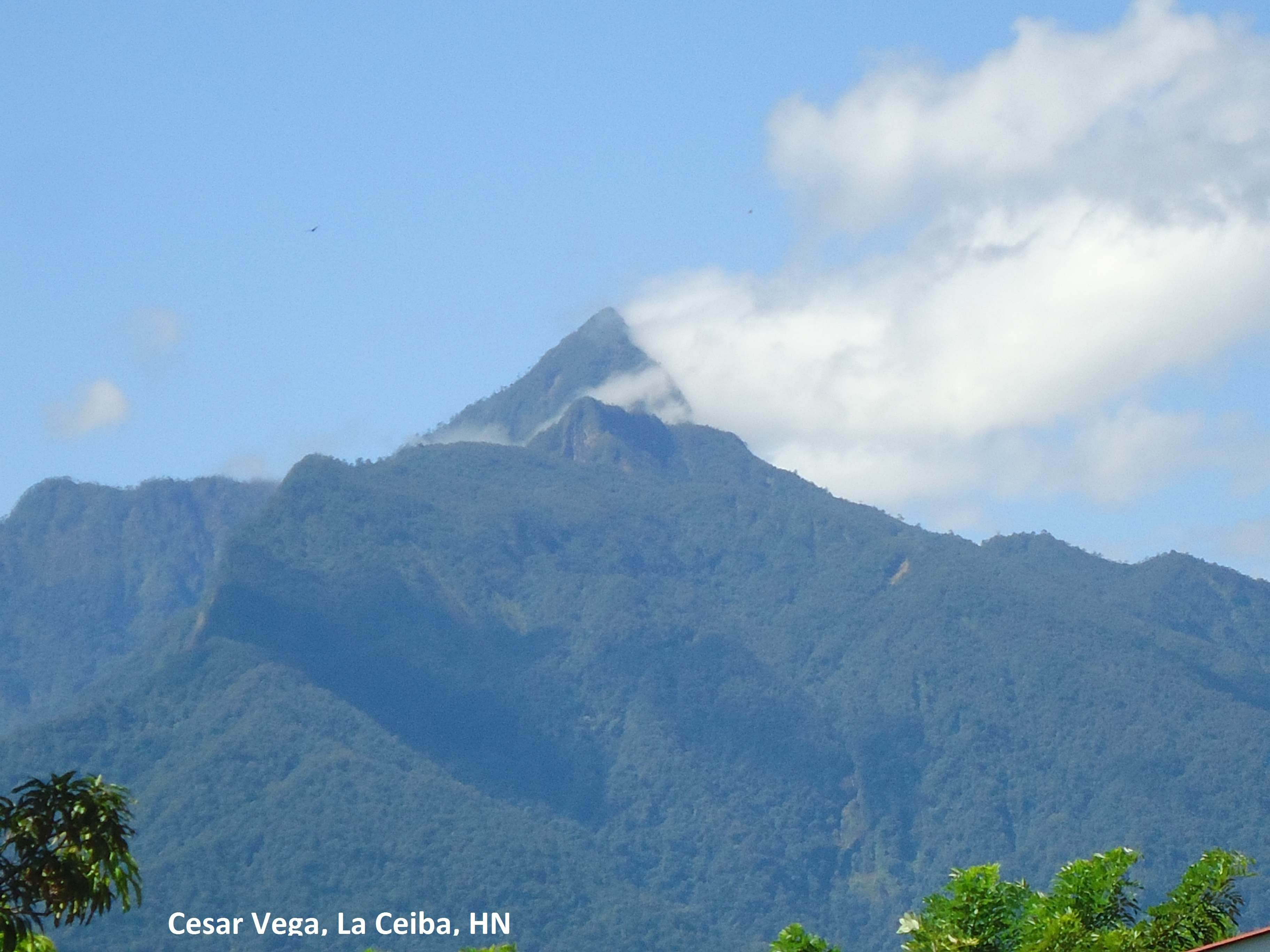 Tomado desde La Ceiba, cabecera departamental de Atlantida, HONDURAS. Fotografo: Cesar A. Vega